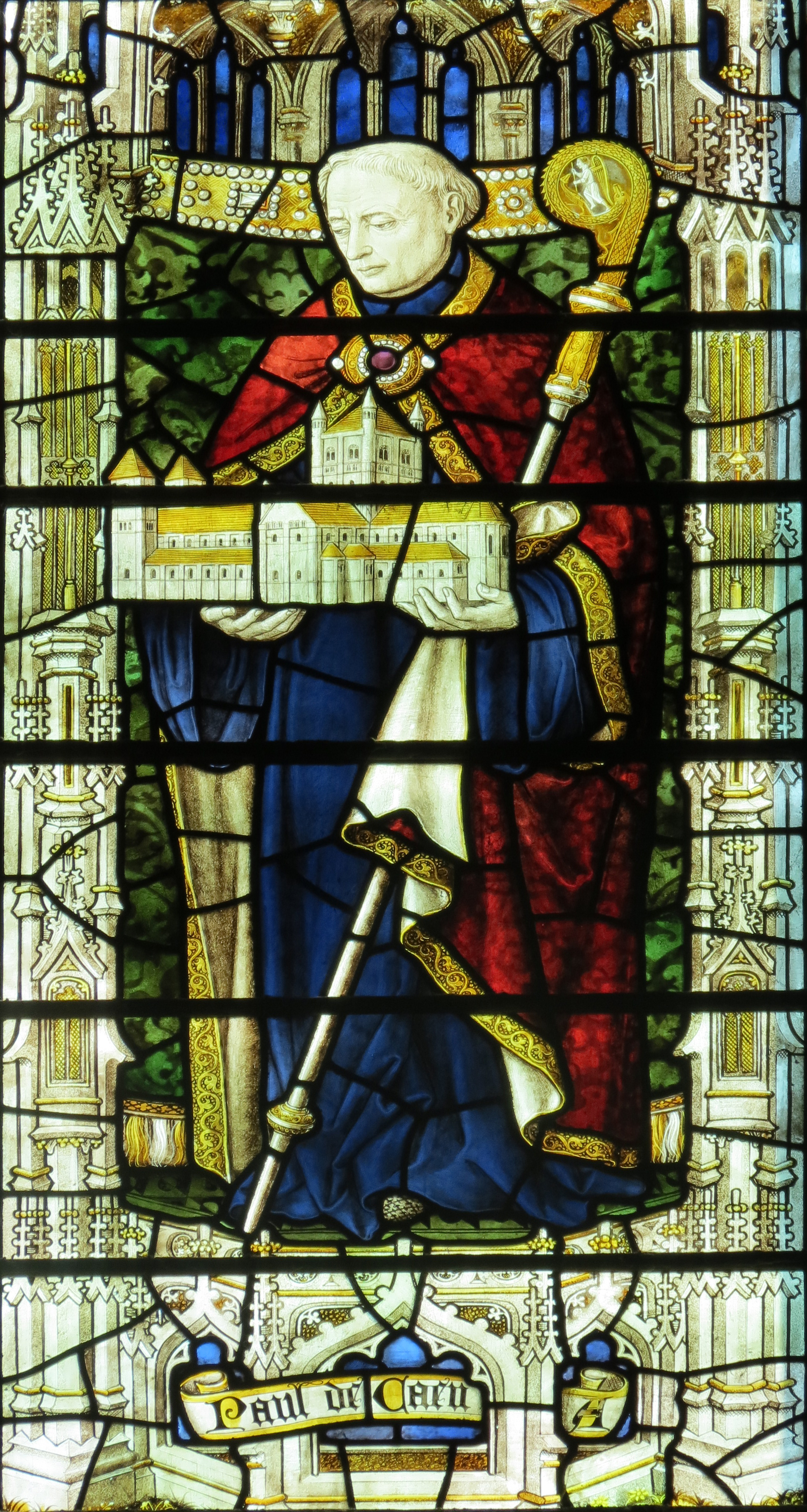 Vitrail représentant Paul de Caen.